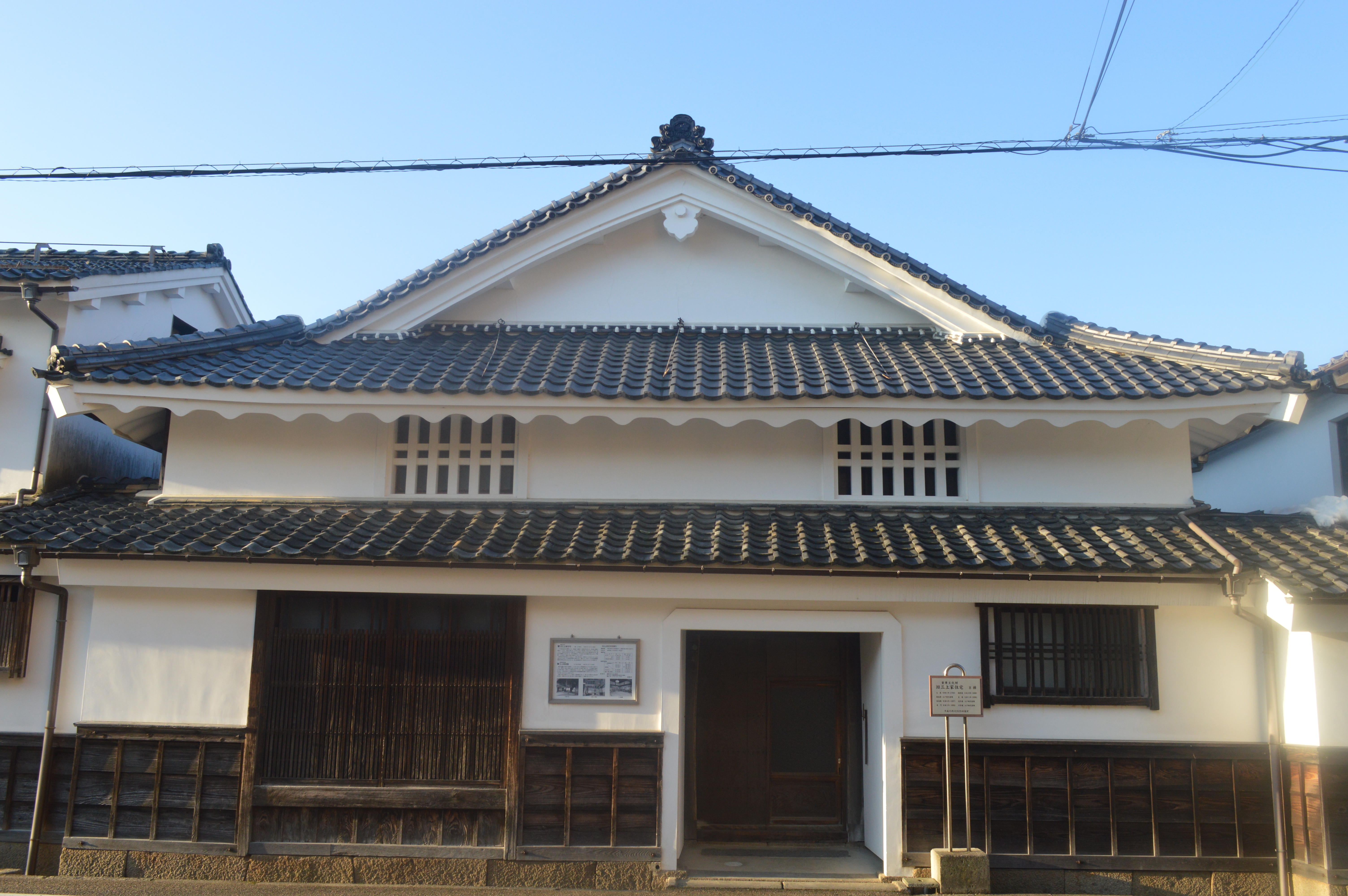 京都府宮津市にある旧三上家住宅。国の重要文化財に指定されている。